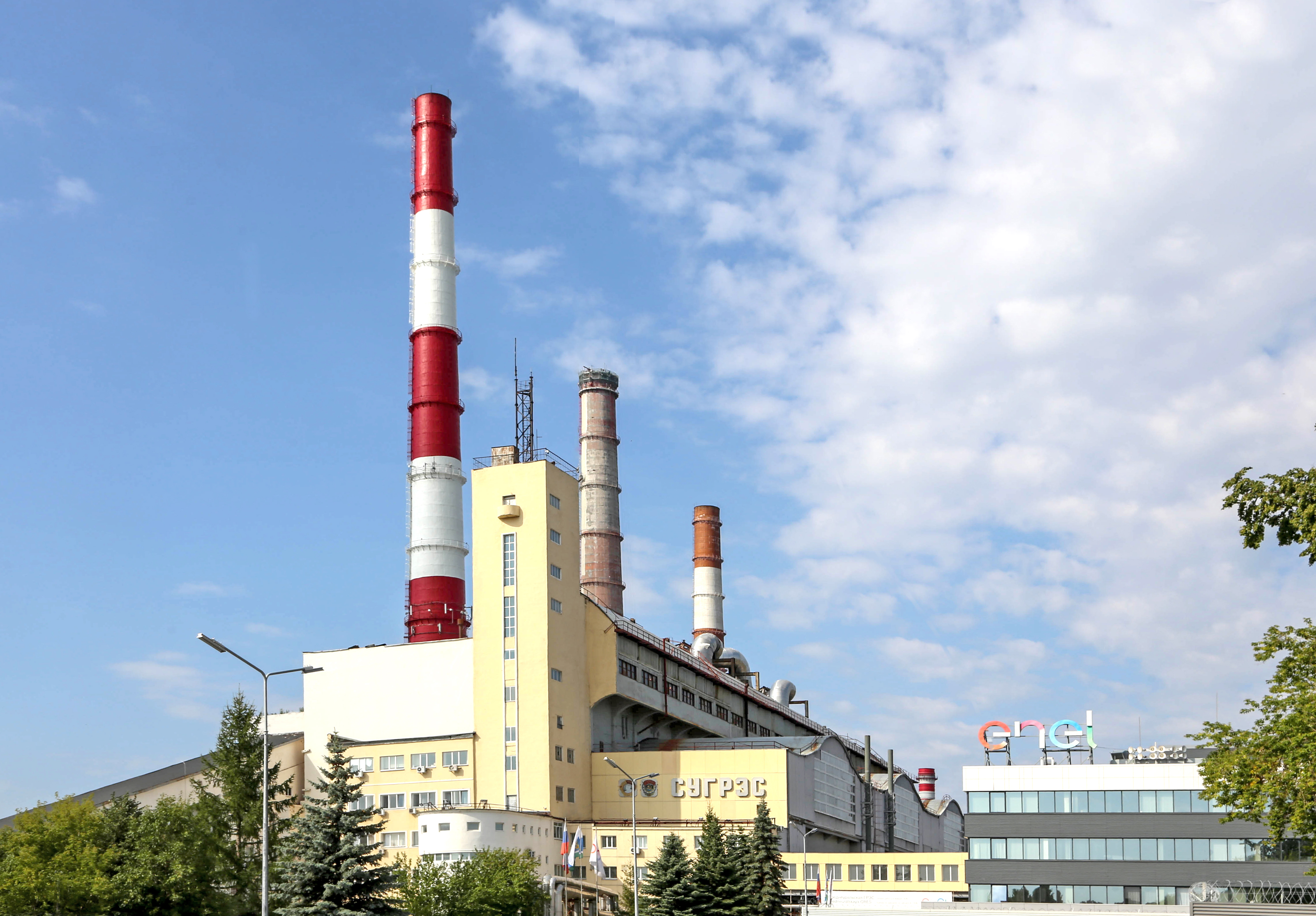 Zavodfoto, Среднеуральская ГРЭС